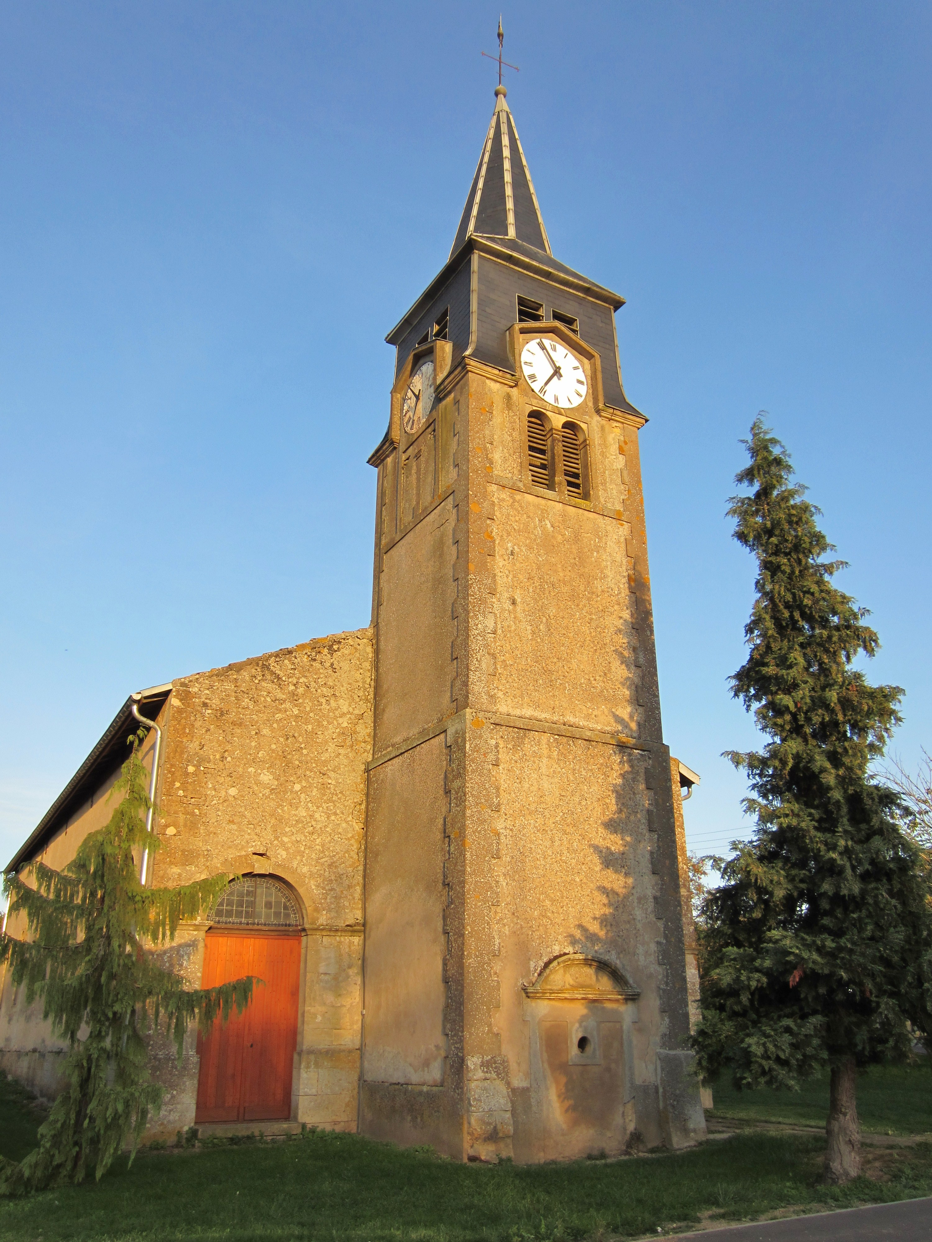 Description eglise saint Sebastien Gondrecourt eglise saint Sebastien Gondrecourt